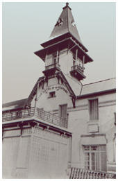 Antiguo Hotel de la Ventana cerca de Tornquist, Buenos Aires.